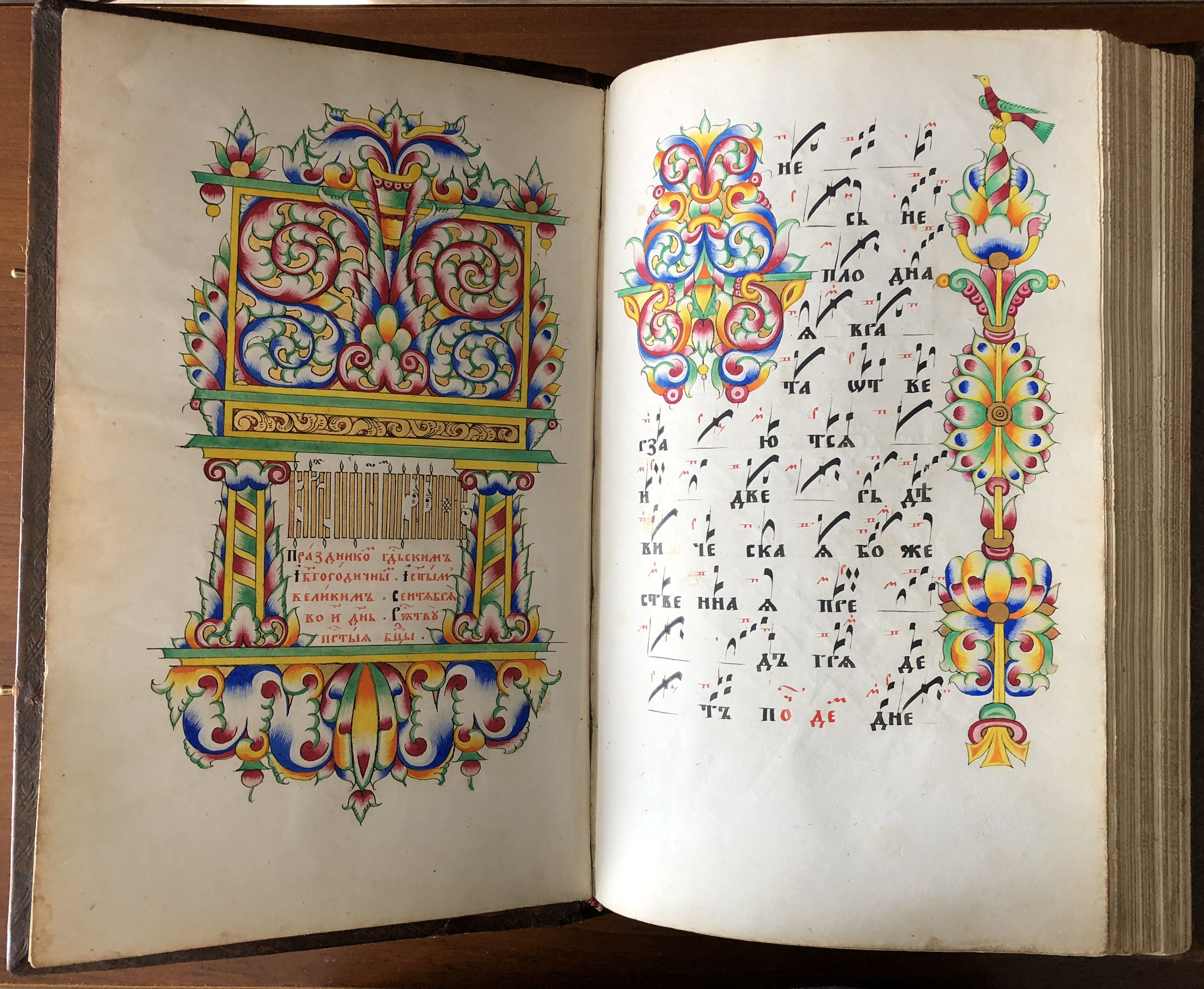 Рукопись "Праздники деместенного распева" (Гуслицы, конец 19 века; частное собрание)